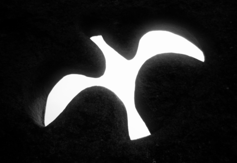 Minerve